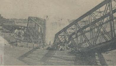 题名： 今日之黄河及淮河两大铁桥:(八幅照片) 文献来源： 《大美画报》 出版时间： 1938 年 卷期(页)： [ 第3期 ，2页 ]